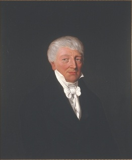 Portrett av Alexander Christian Møller. Dr regimentkirurg, brystbilde på lerret, sort drakt med hvitt kalvekryss, kort, hvitt hår.